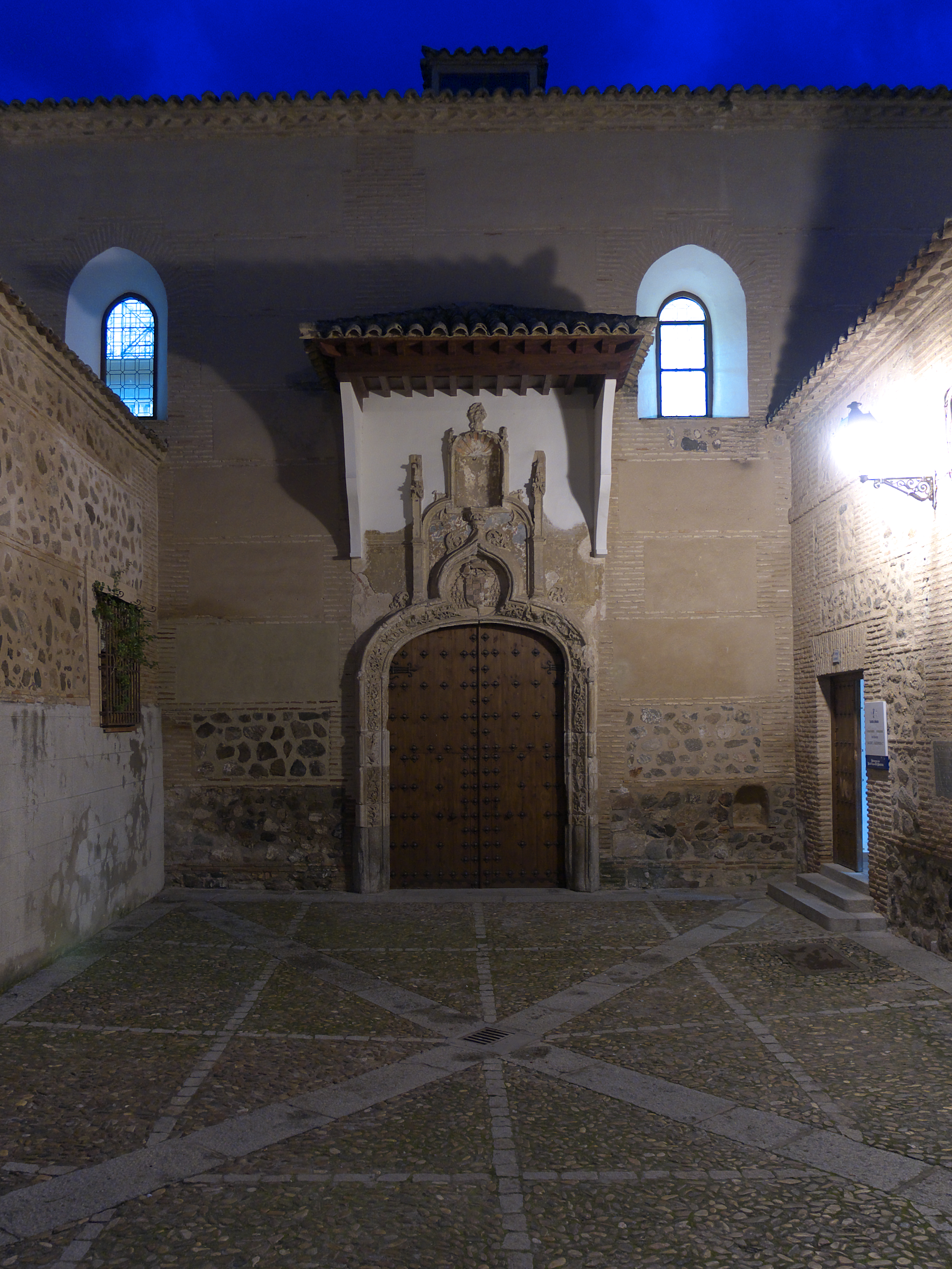 Antiguo convento de franciscanas fundado por el Cardenal Cisneros (1541)